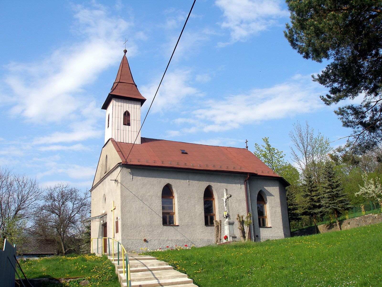 Obec Tuhrina okres Prešov región Šariš